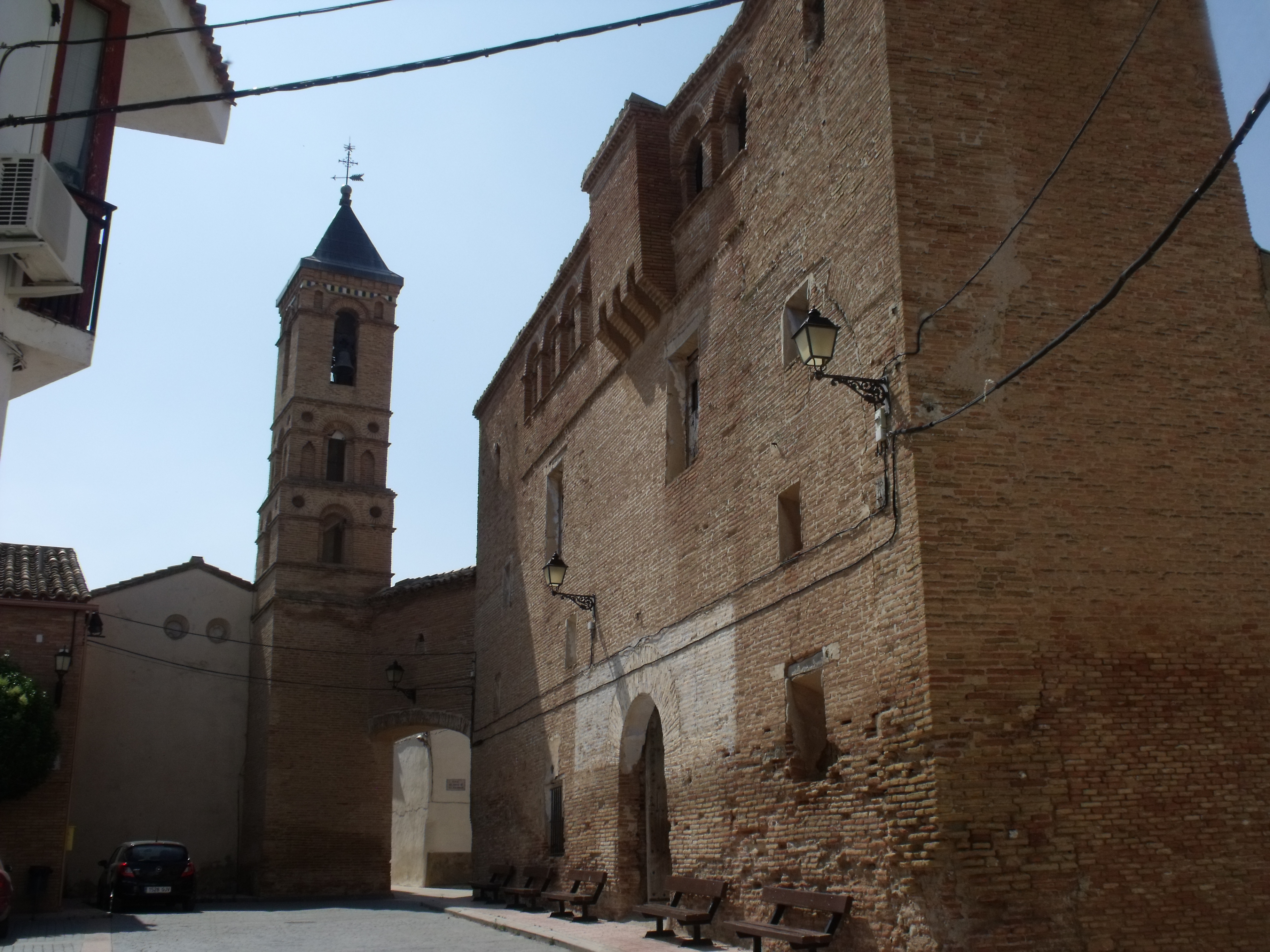 Conjunto de iglesia y casa fortificada de Mozota